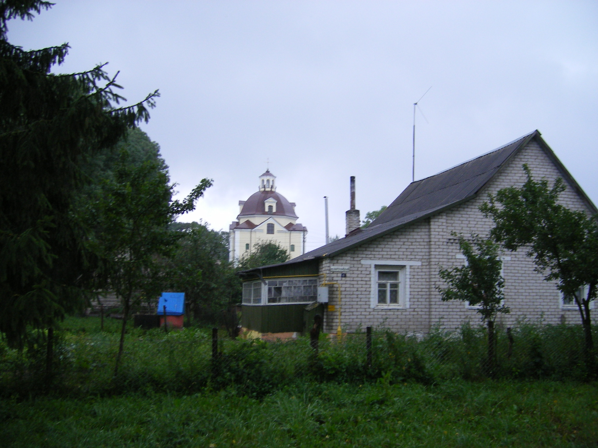 Widok na kościół Matki Bożej Szkaplerznej i klasztor Karmelitów w Miadziole. Myadzel, костел Богоматери Шкаплерной